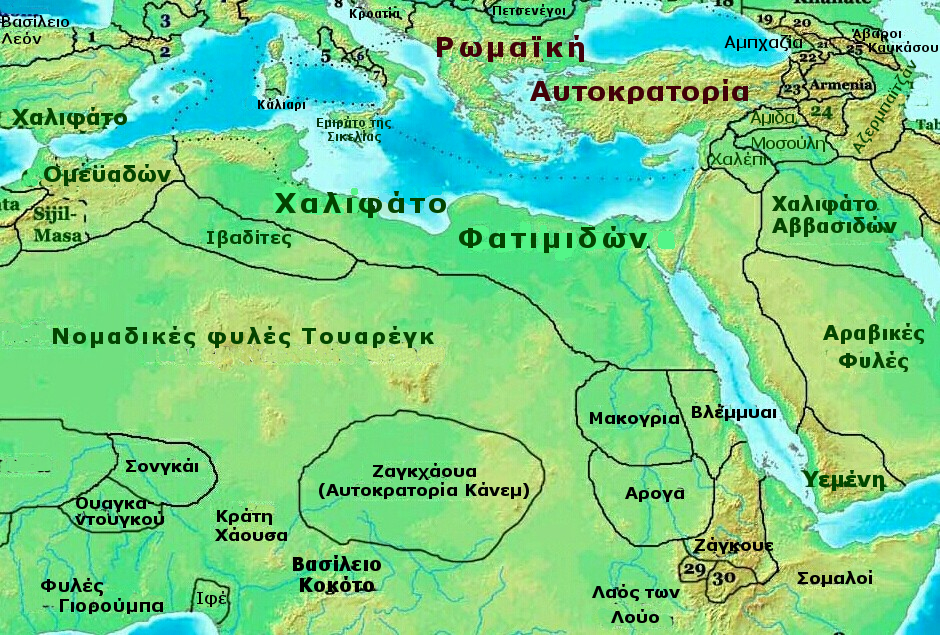 Χάρτης της Αυτοκρατορίας των Φατιμιδών το 1025 μ.Χ.